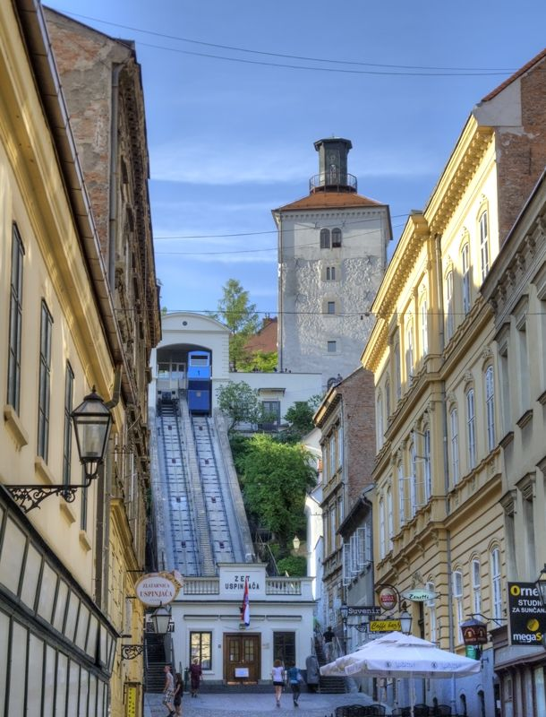 Zagreb